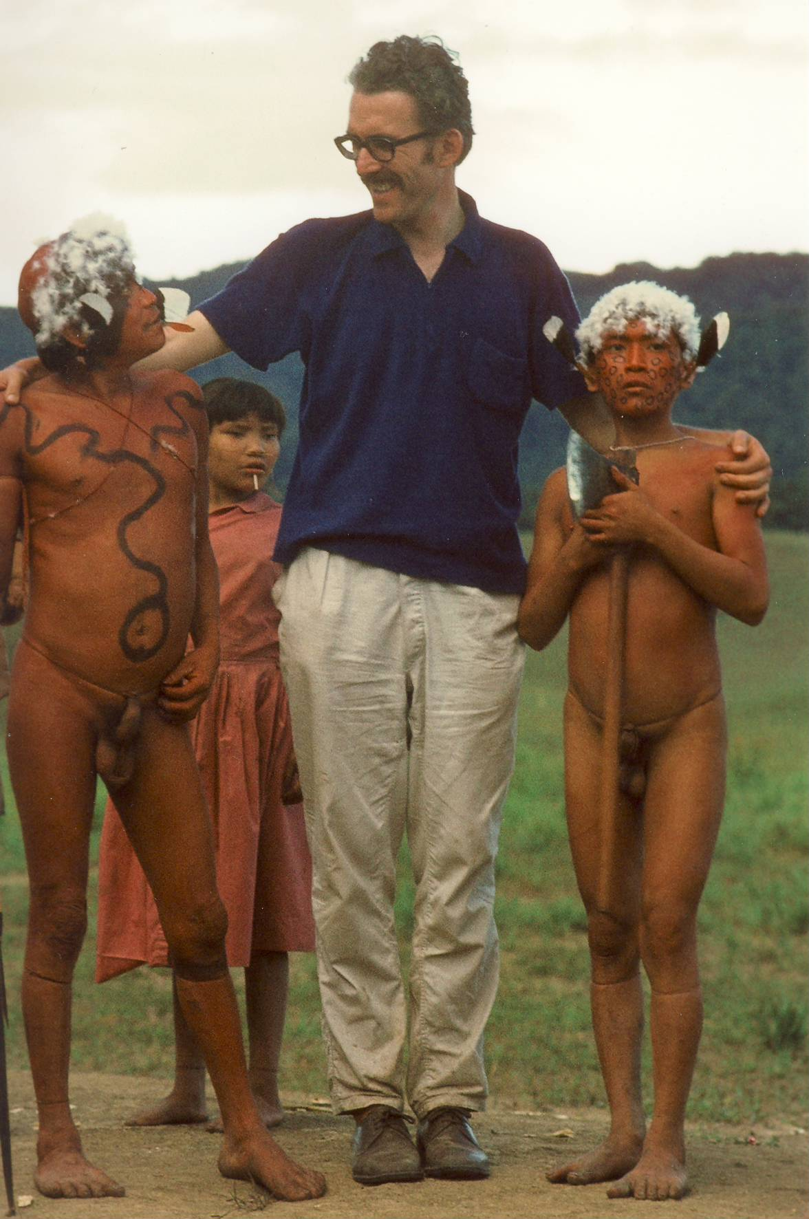 Größenvergleich Europäer Waika Indianer